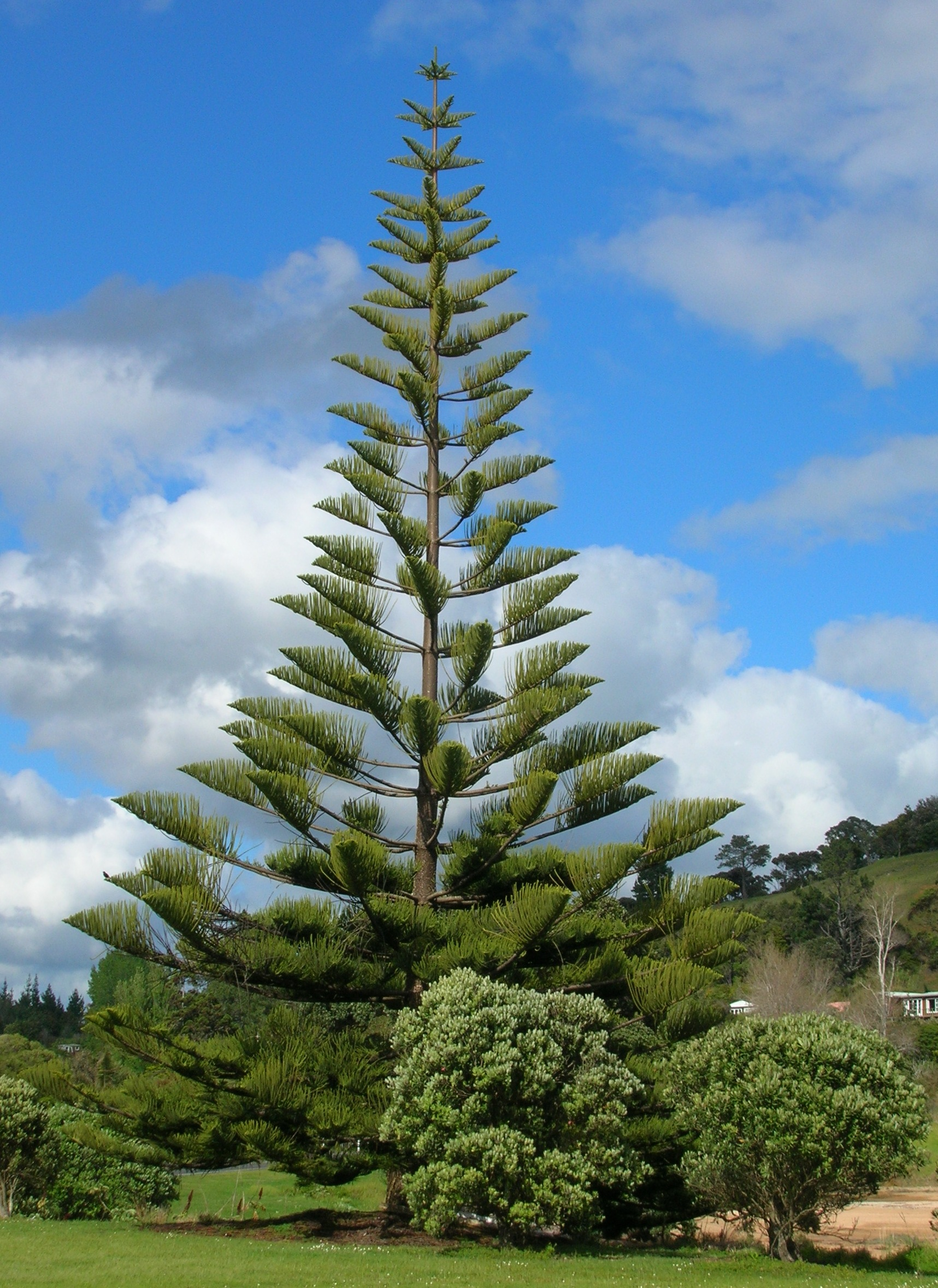 i103005 013